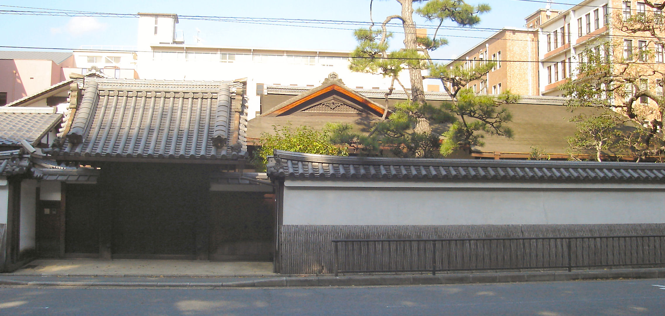 Reizeike jyutaku